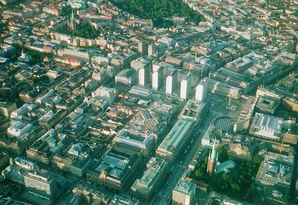 Stockholm City från ovan 2001. Sergels torg, Hötorget, Hötorgsskraporna, Stureplan och Humlegården. Upphovsman: Supernissen 2005